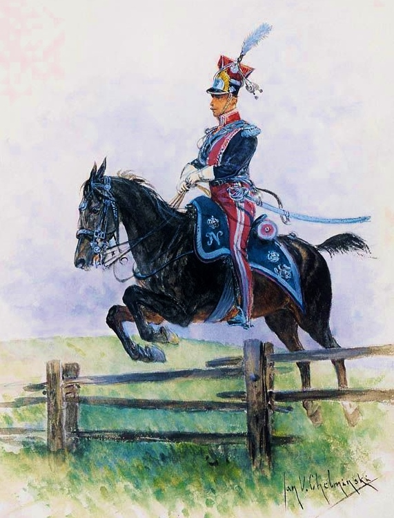 Chevau-léger polonais de la Garde impériale au galop.